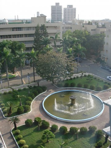 國立虎尾科技大學噴水池